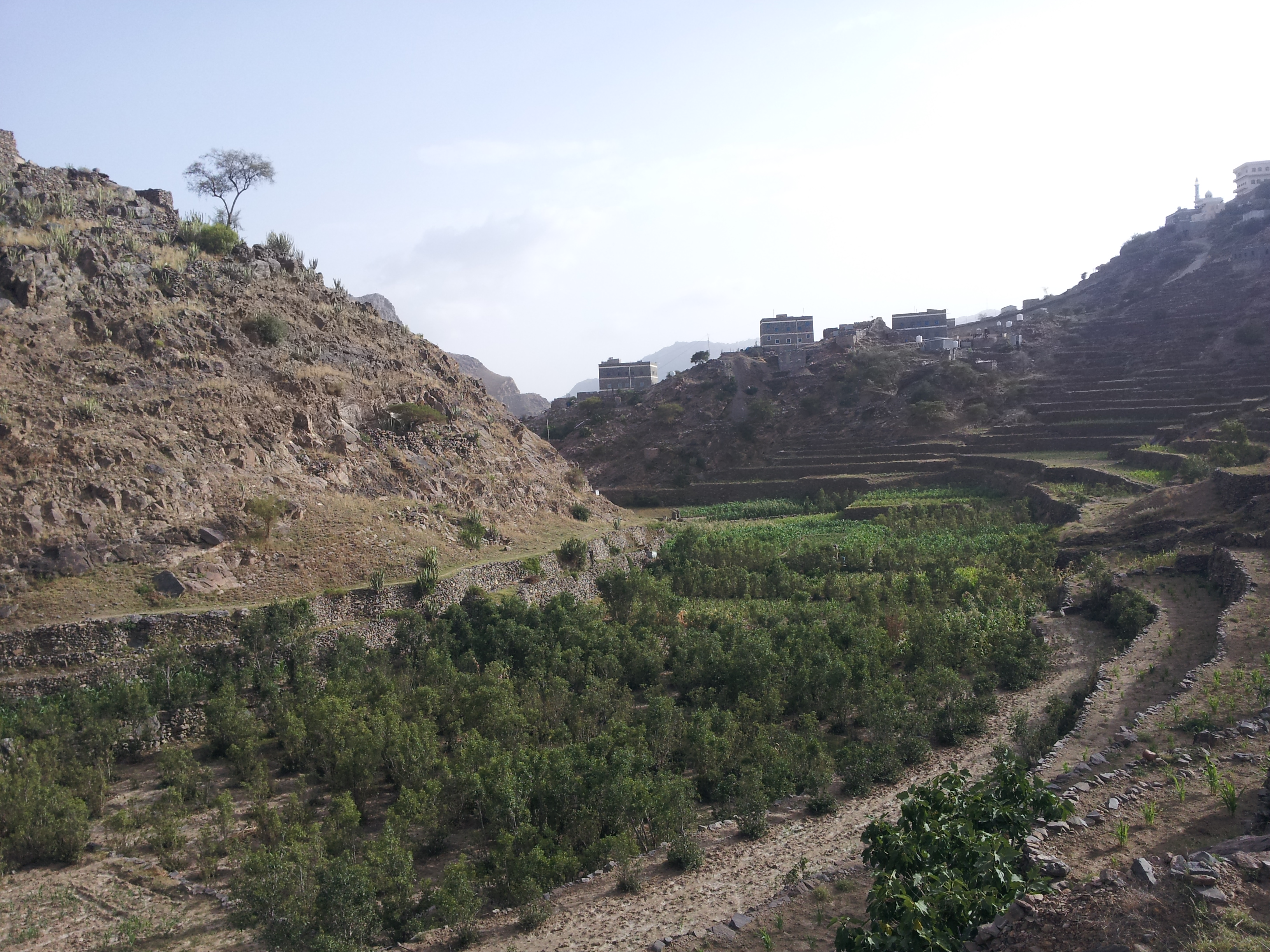 عقبة سلمى مع الوادي